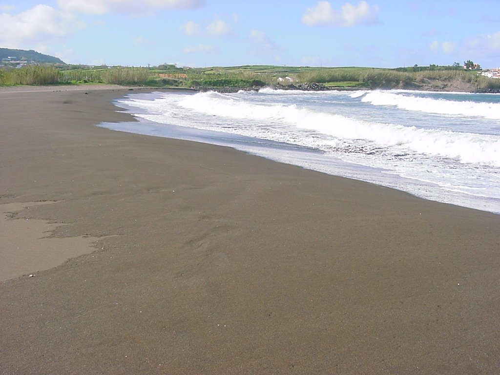 Praia da Riviera, areal, Praia da Vitória, ilha Terceira, Açores, Portugal.